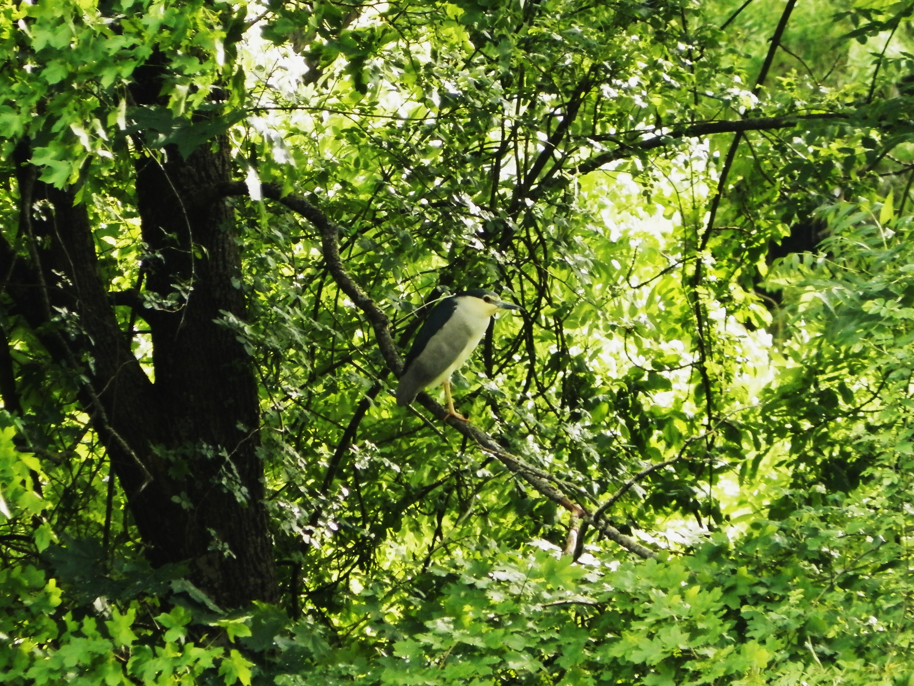 Chavkoš nočný (nycticorax nycticorax) - Malá Čalomija